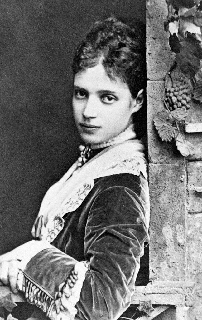 Мария Фёдоровна, Императрица Всероссийская